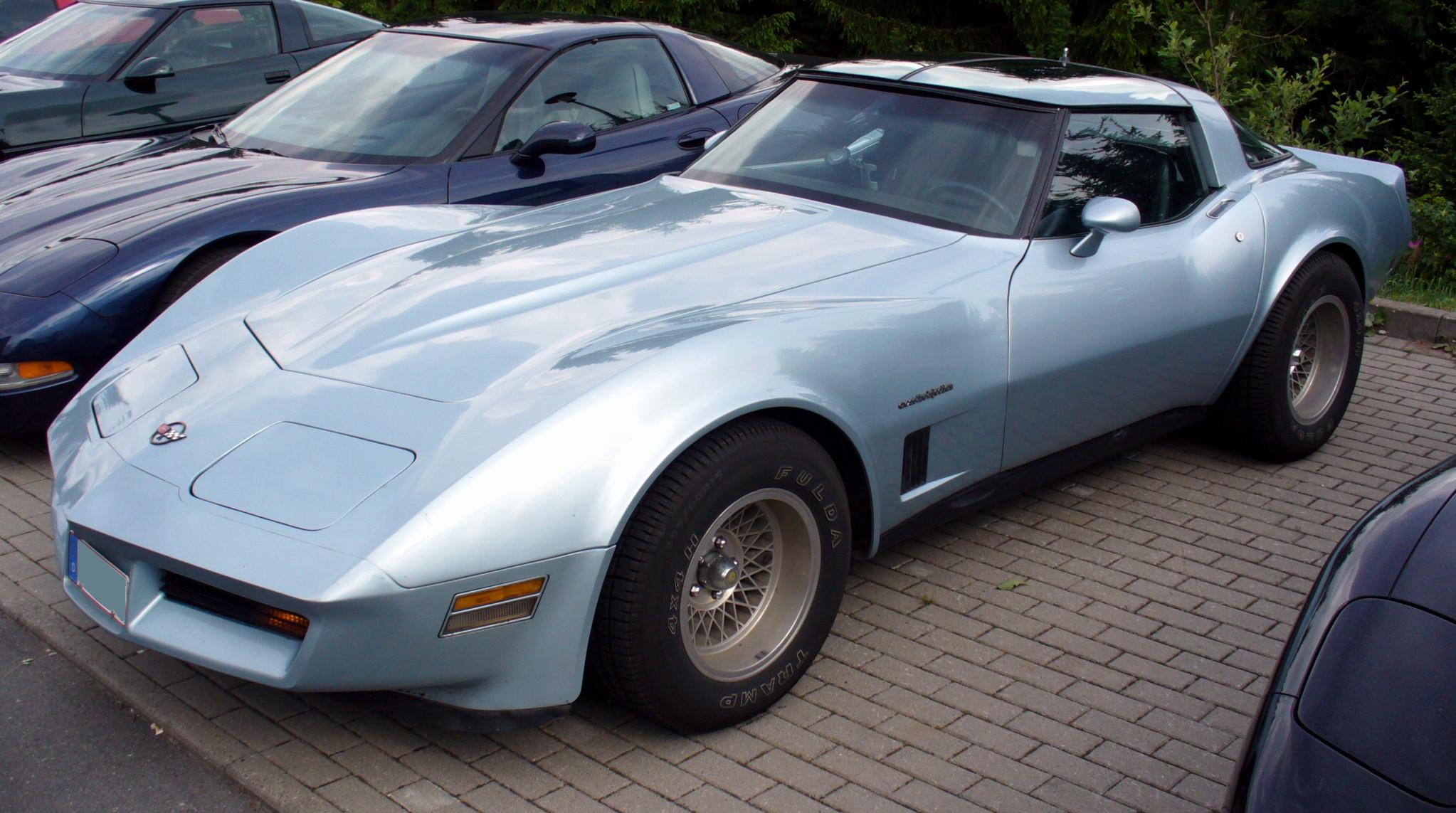 Chevrolet Corvette C3 Coupé